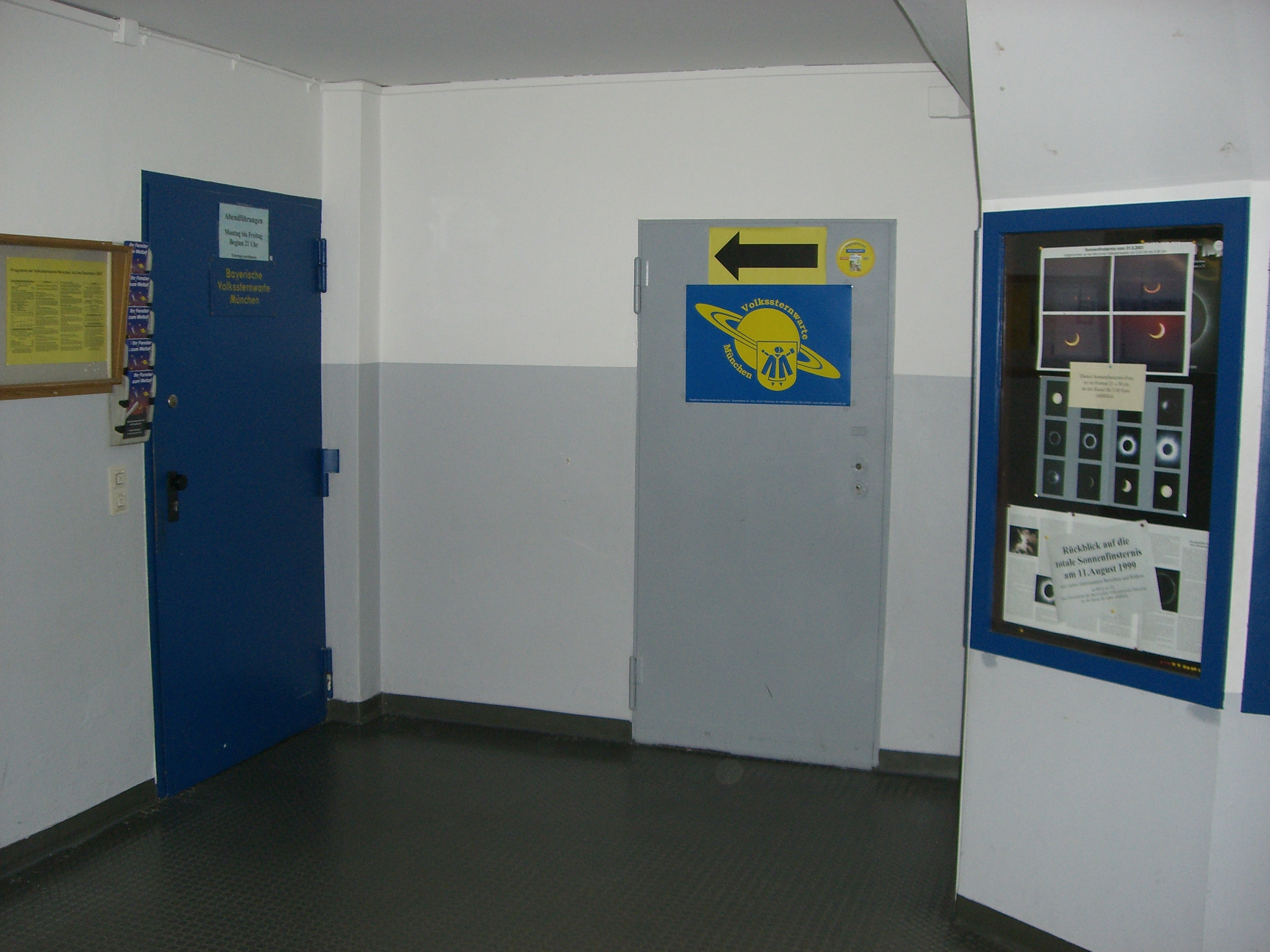 München - Volkssternwarte (Eingangsbereich)